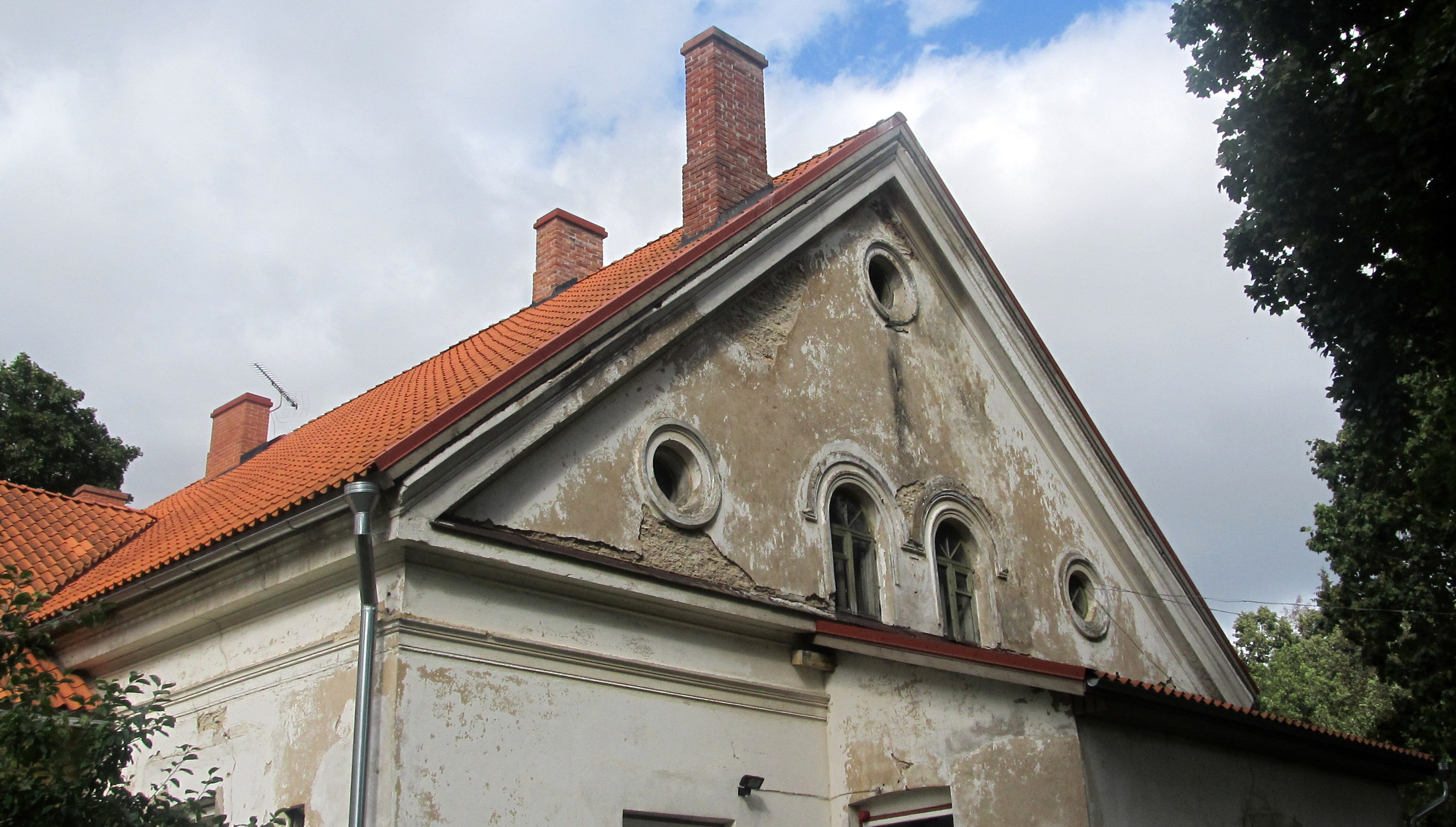 Undla mõisa peahoone, katuseviil